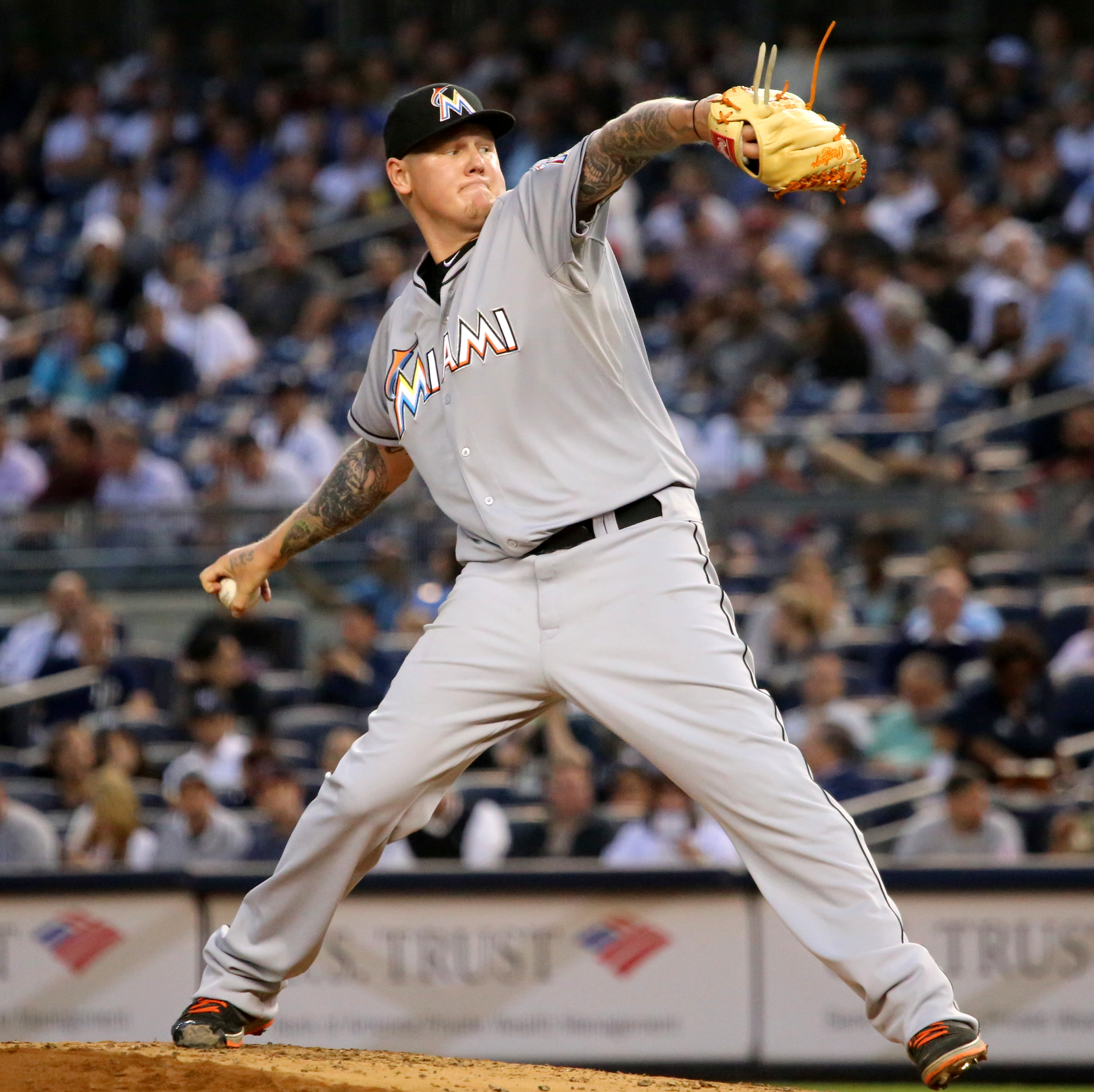 Mat Latos